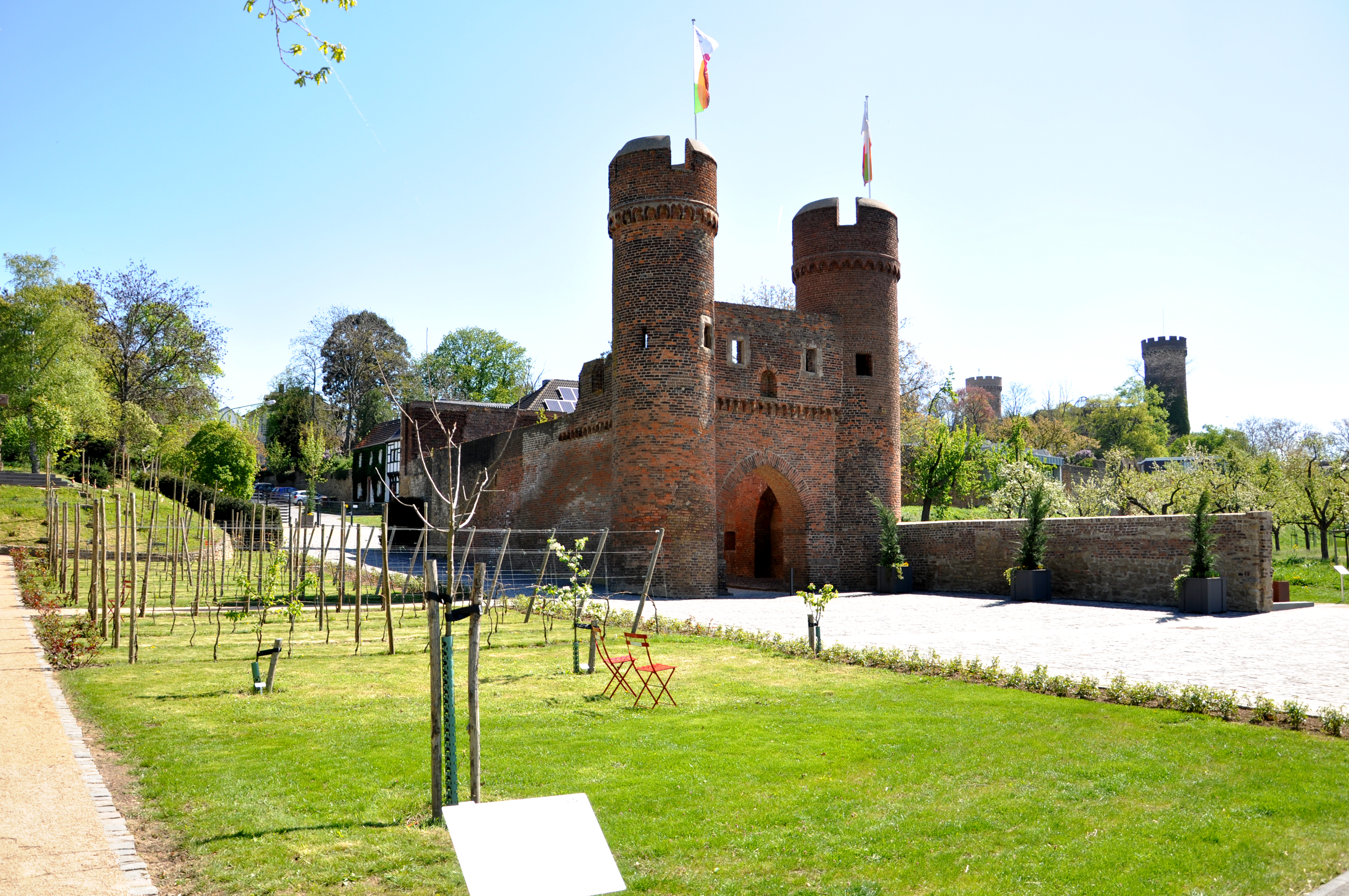 Landesgartenschau Zülpich 2014, Impressionen vom Eröffnungstag 16. April 2014